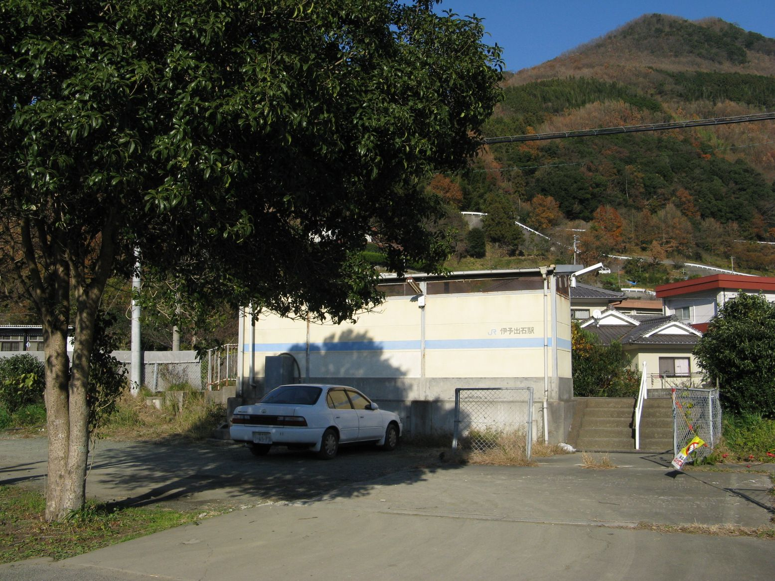 予讃線伊予出石駅 駅舎